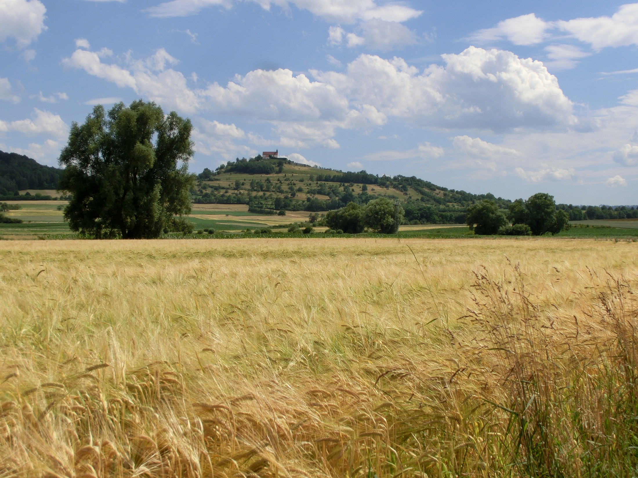 Der Wurmlinger Kapellenberg mit der Sankt-Remigius-Kapelle, Baden-Württemberg; aufgenommen von Unterjesingen.